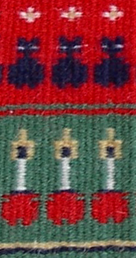 Detalj av gubbaväv. Detalj från här